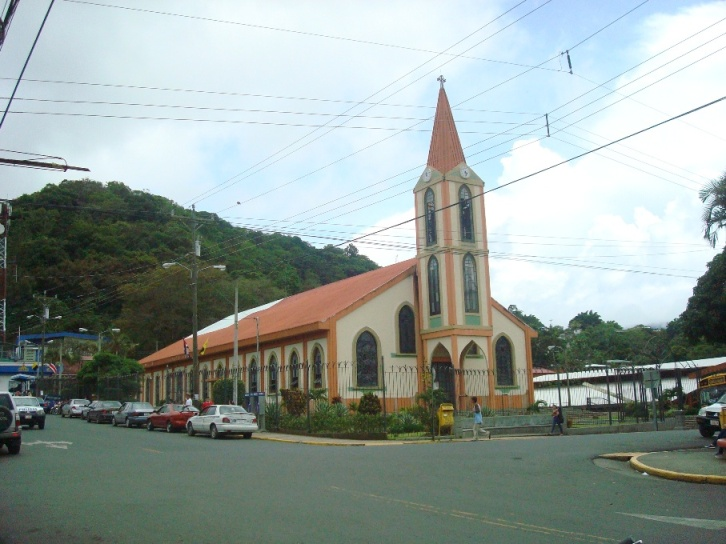 Iglesia de San Ignacio de Loyola, Acosta, Costa Rica.